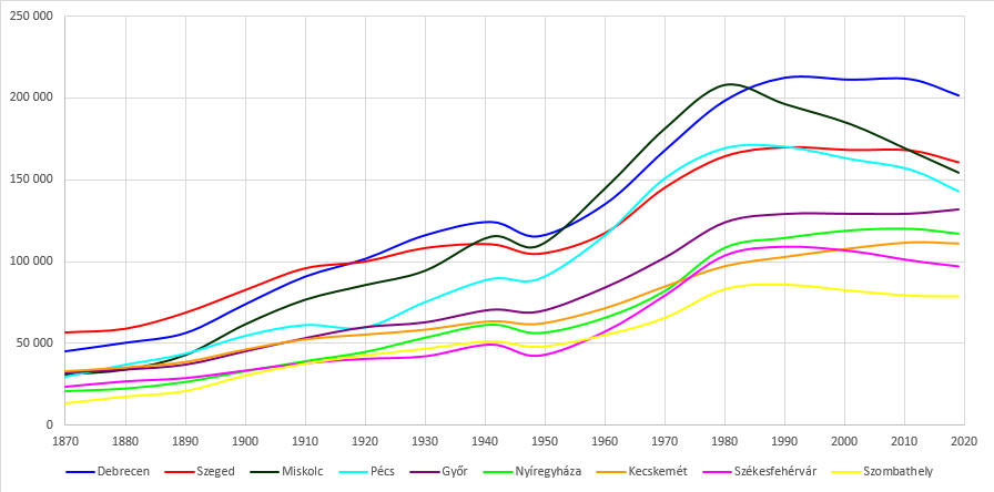 A legnagyobb magyar városok népesség szerint (Budapest nélkül) 1870-2019